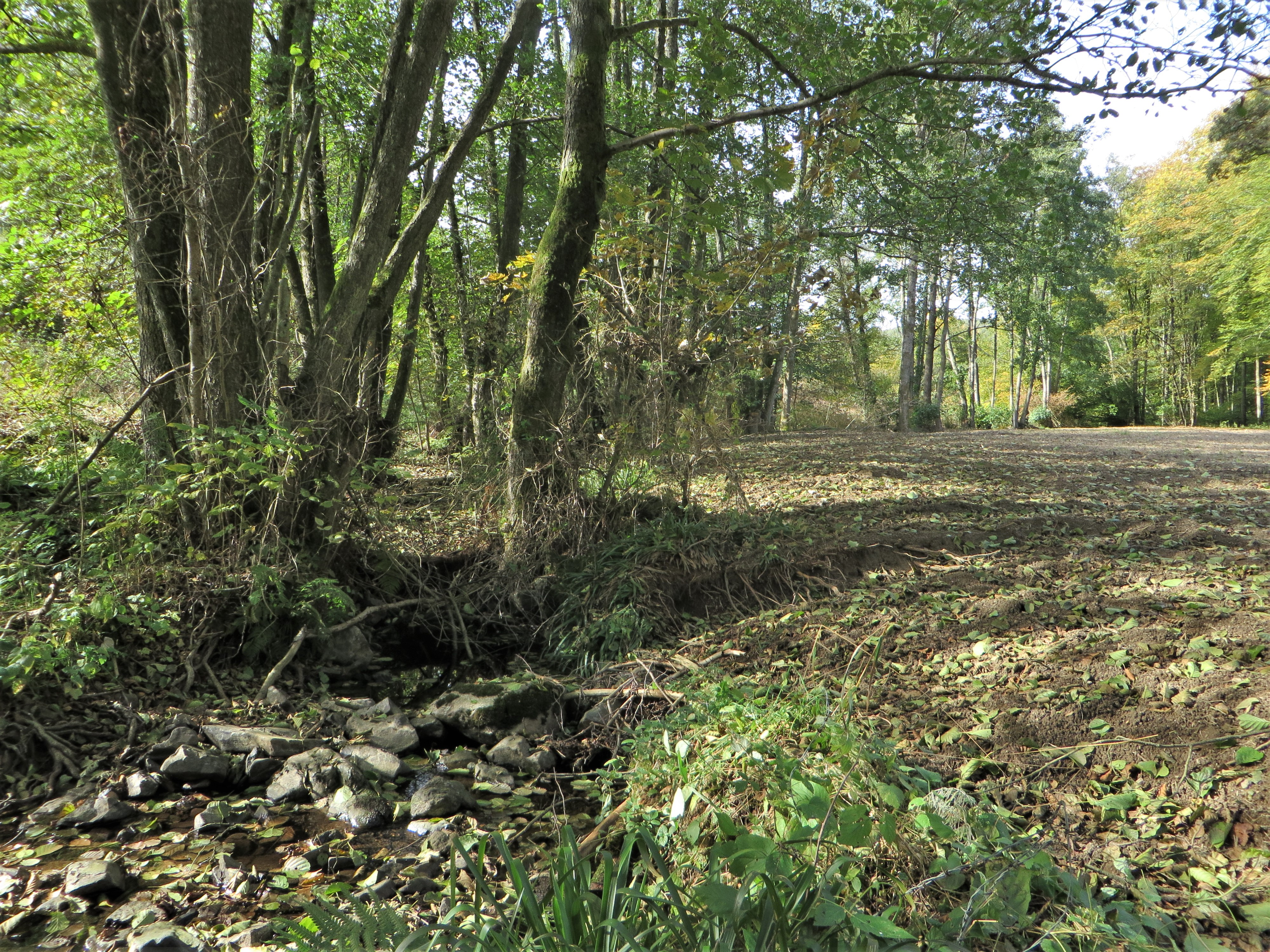 Naturschutzgebiet (OE-038) „Wesebachtal“ in Attendorn, Nähe Ebbergweg bei Ebbelinghagen.